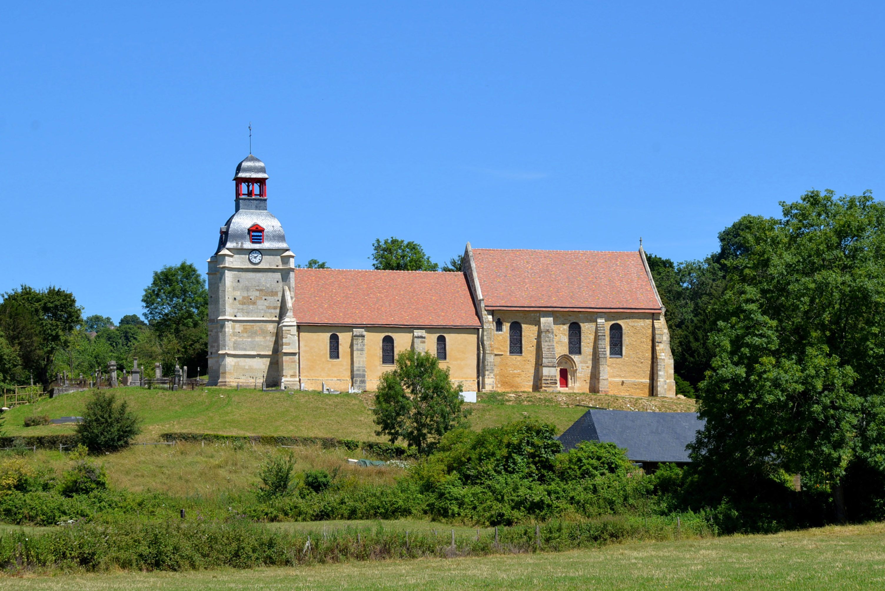 Notre-Dame-d'Estrée (Calvados)